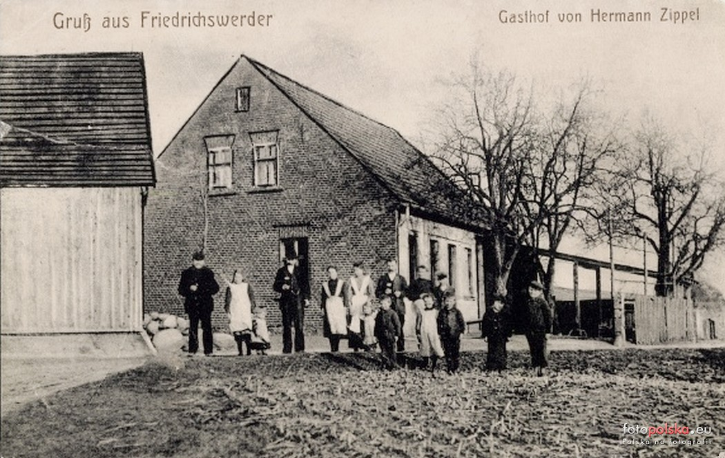 historyczne zdjęcie mieszkańców